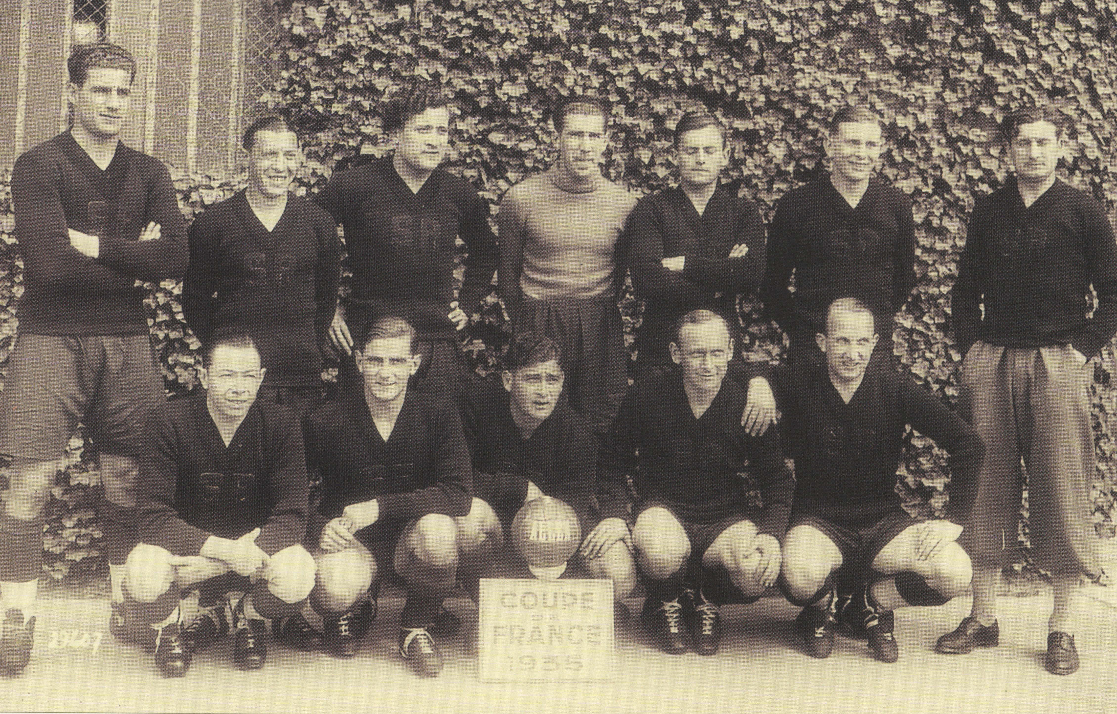 Equipe du Stade rennais UC lors de la finale de la Coupe de France 1935. En haut, de gauche à droite : Carlos Volante, Jean Laurent, Georges Rose, Jean Collet, Franz Pleyer, Gaston Gardet et Josef Schneider (entraîneur) ; En bas, de gauche à droite : Guy Rouxel, Georges Boccon, Attilio Bernasconi, André Chauvel et Alexandre Cahours